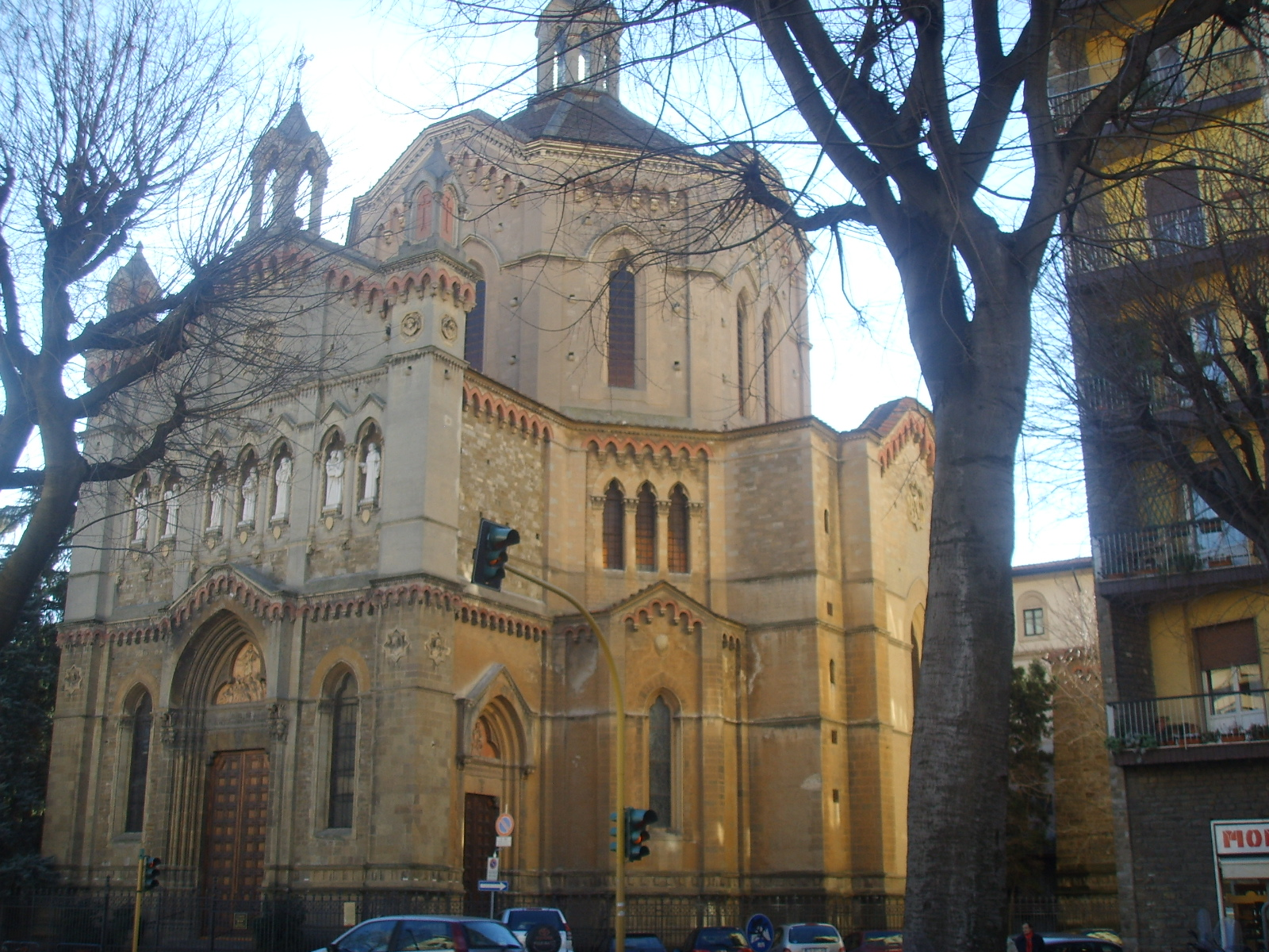 Chiesa_dei_sette_santi in Florence Italy